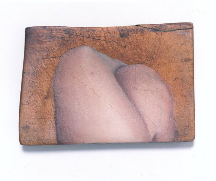 שמן על קרש חיתוך מעץ, 1993